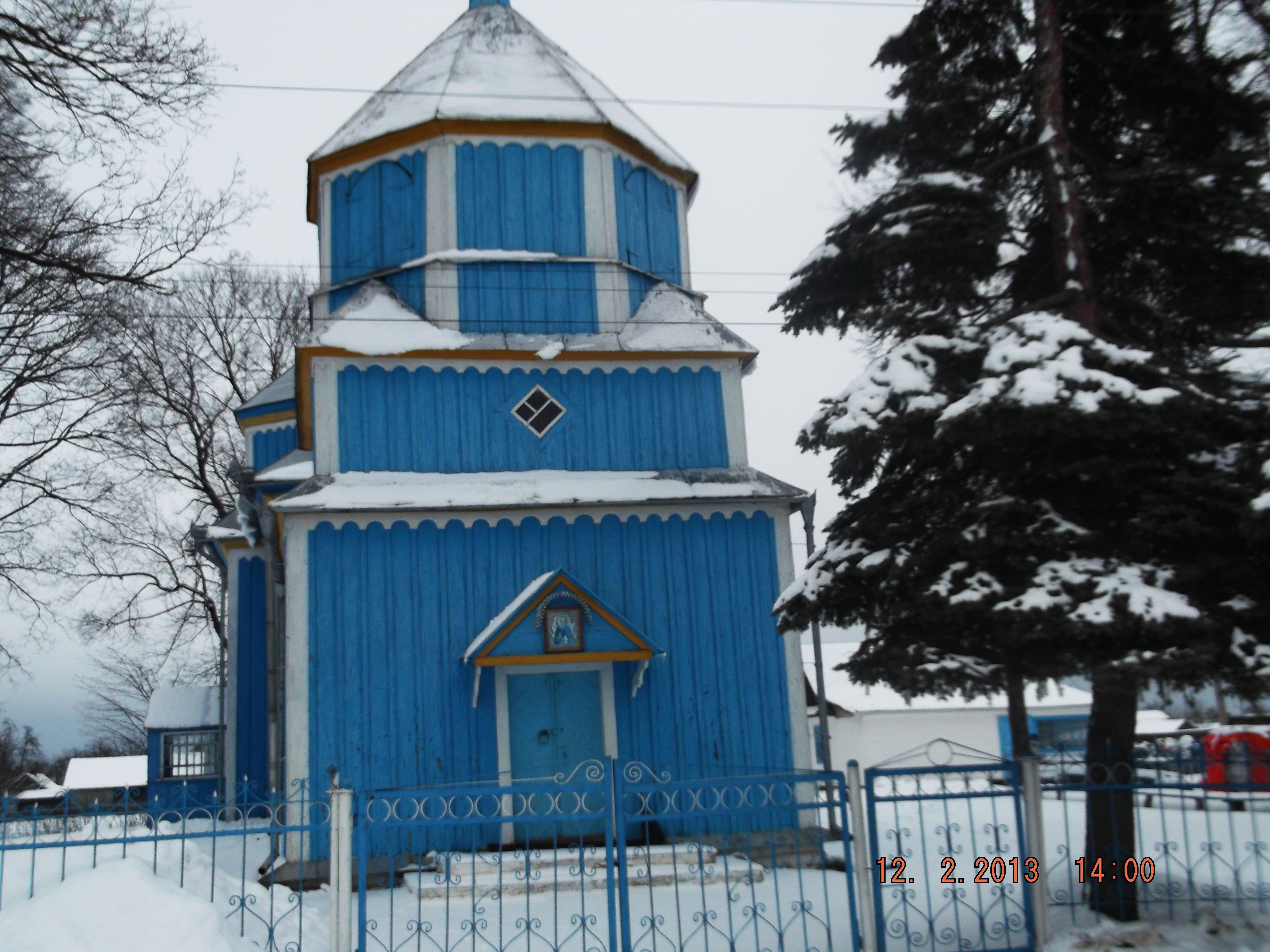 Храм Івана Богослова